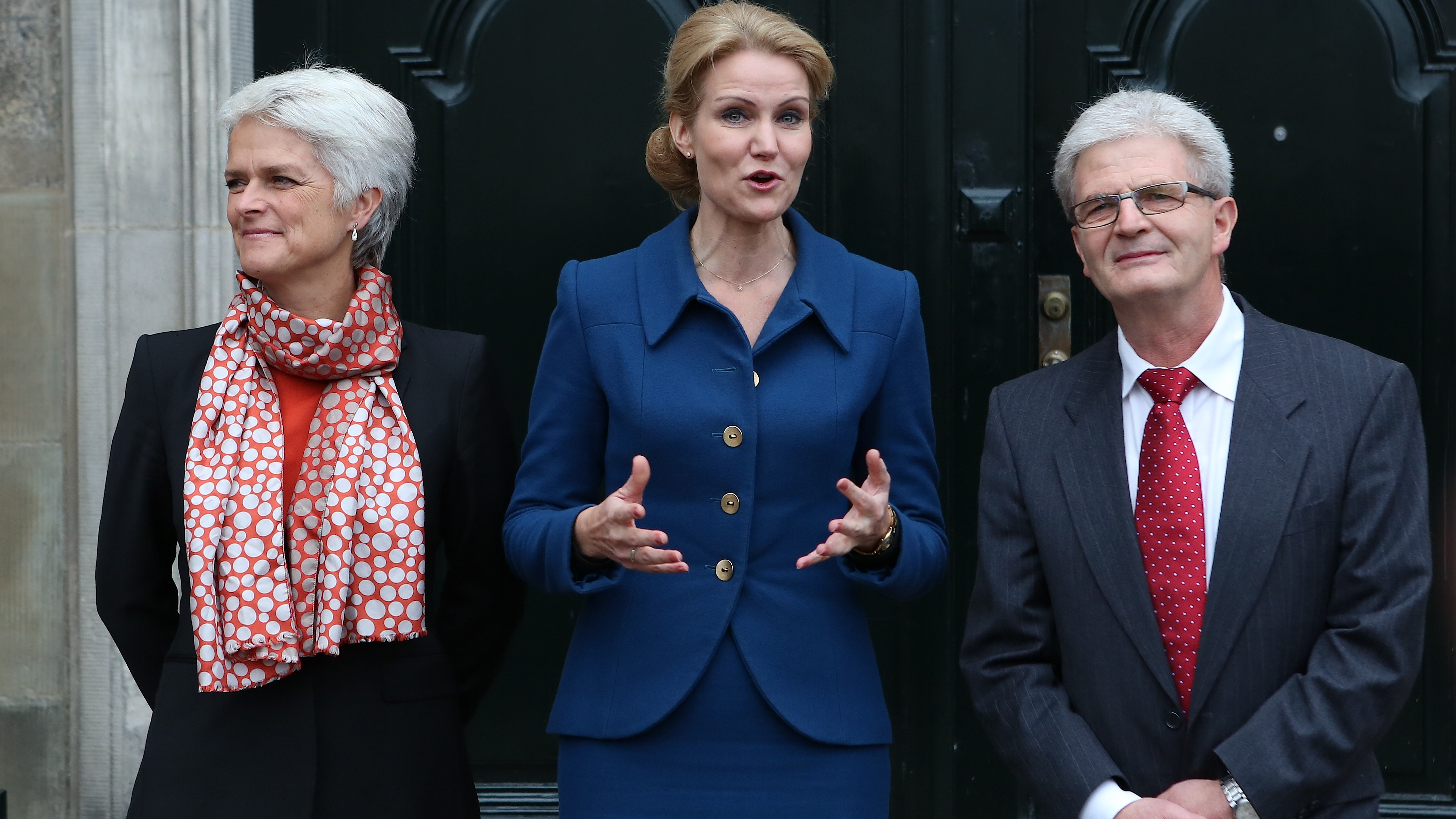 Statsminister Helle Thorning-Smidt præsentere de 2 nye ministre fra partiet SF, Anette Vilhelmsen og Holger K. Nielsen